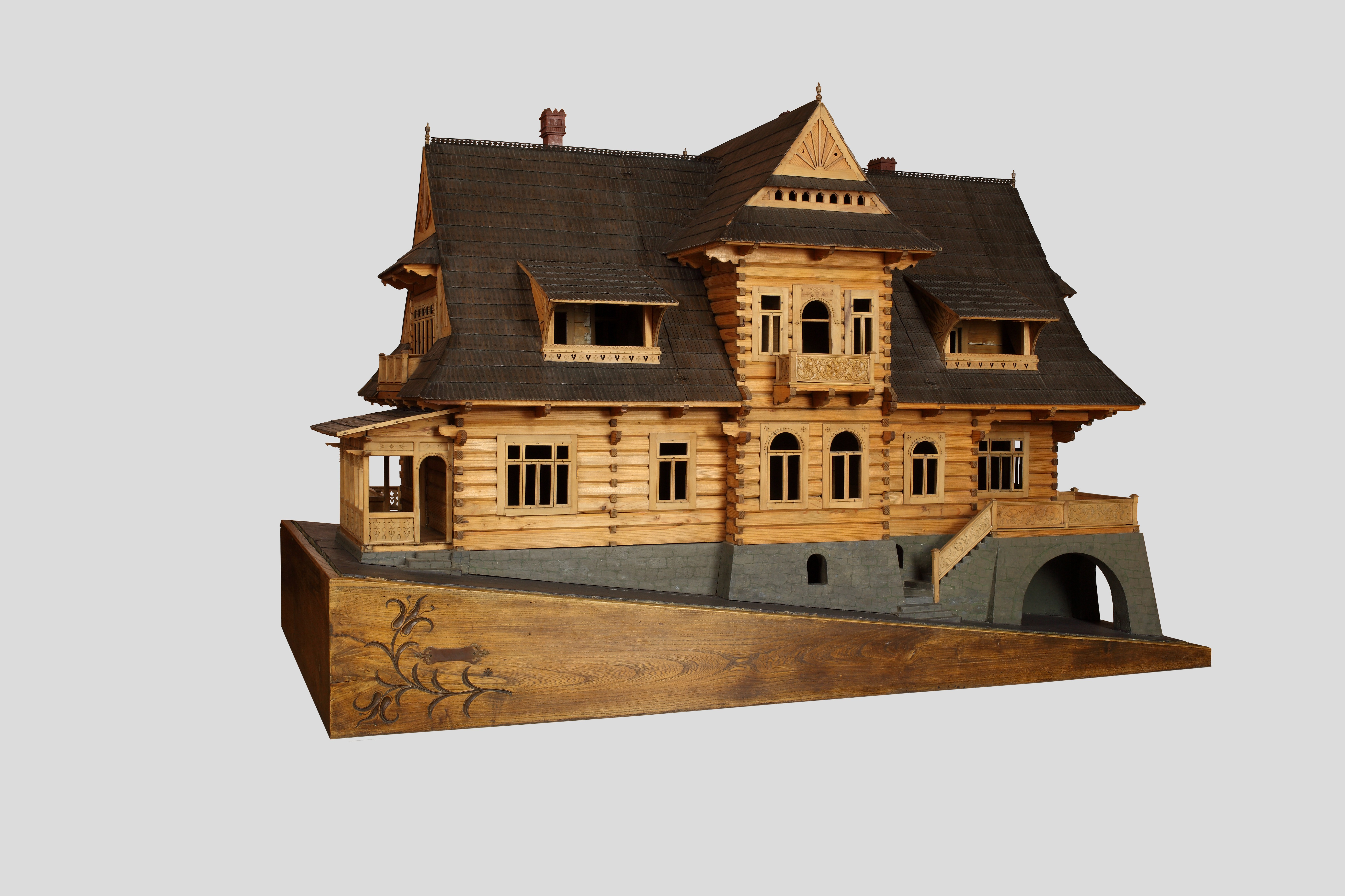 Model of Villa pod Jedlami in Zakopane